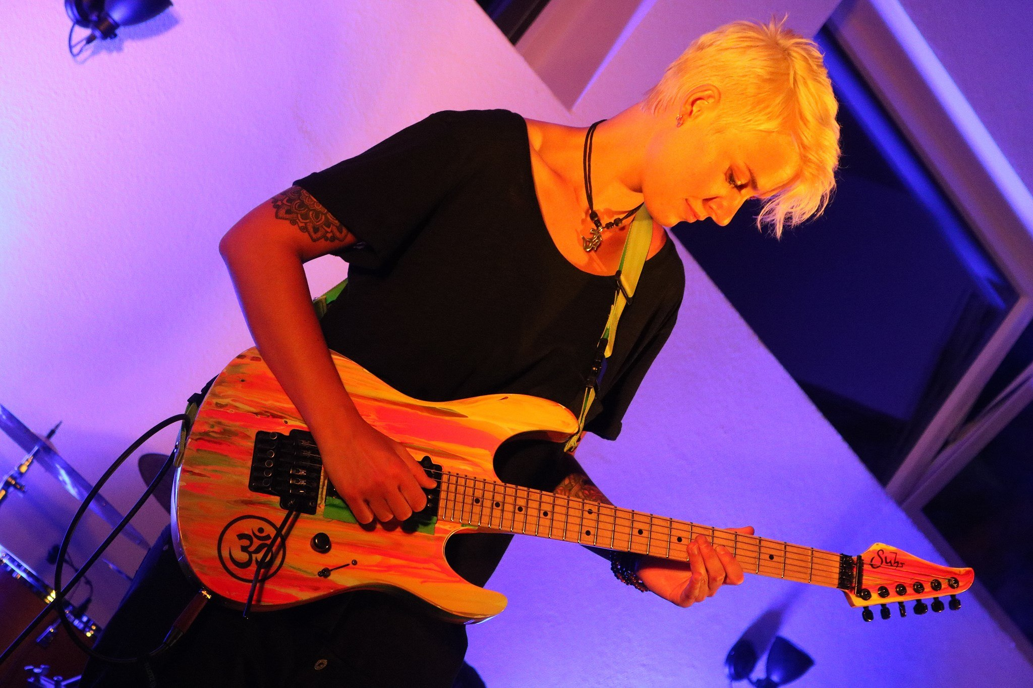 Yasi Hofer, Gitarristin, Gitarre